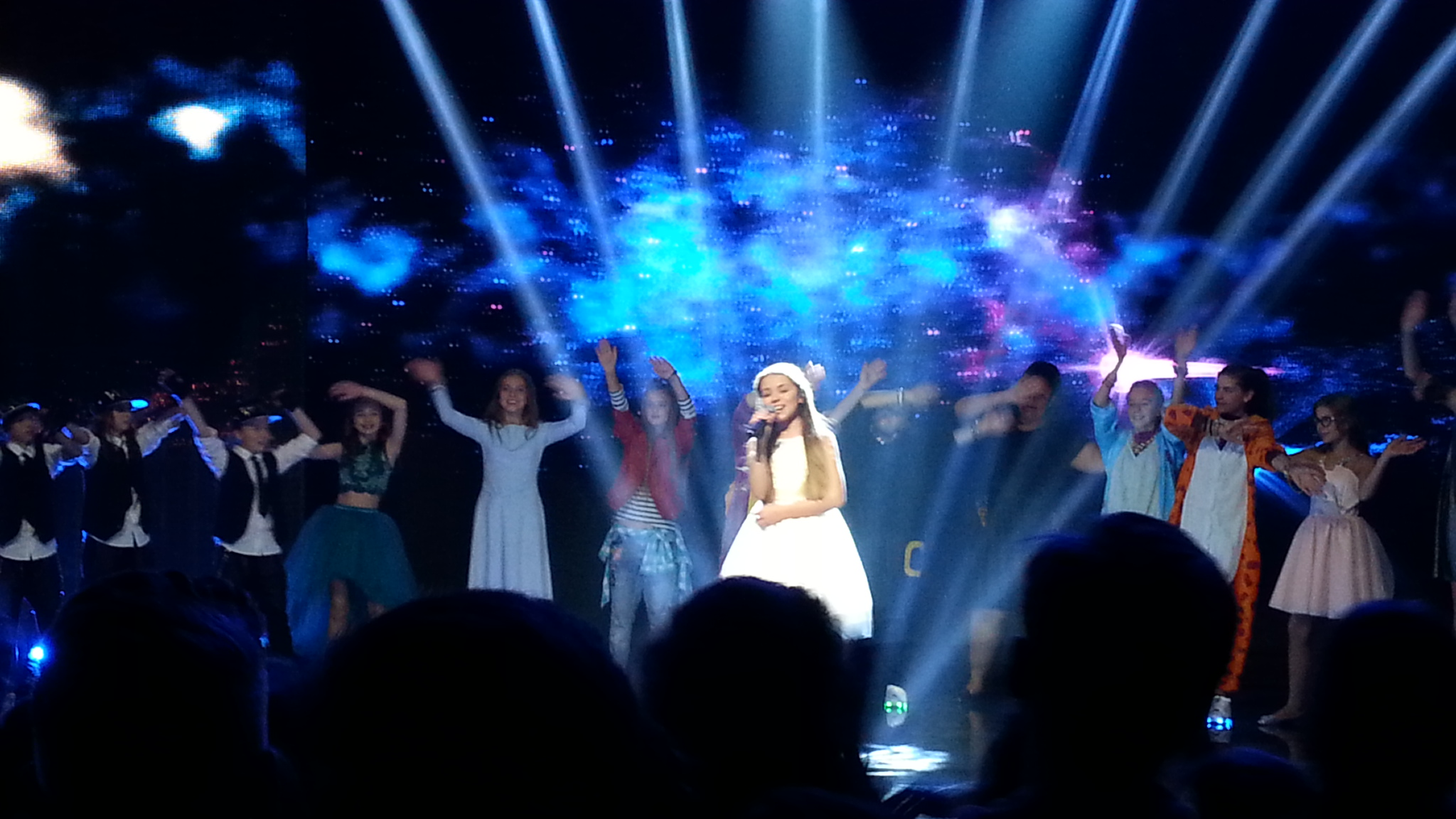 Polska piosenkarka Olivia Wieczorek podczas finału krajowych eliminacji do Konkursu Piosenki Eurowizji dla Dzieci; Warszawa, 15 października 2016